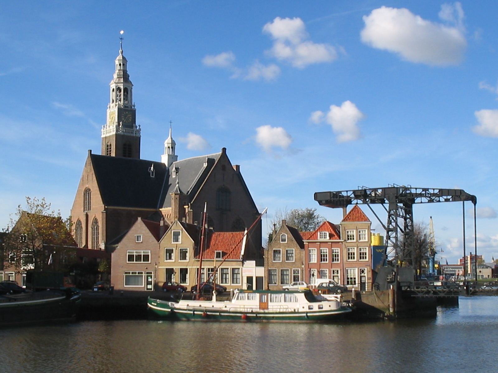 Kerkeiland (Groote Kerk), Maassluis, november 2005